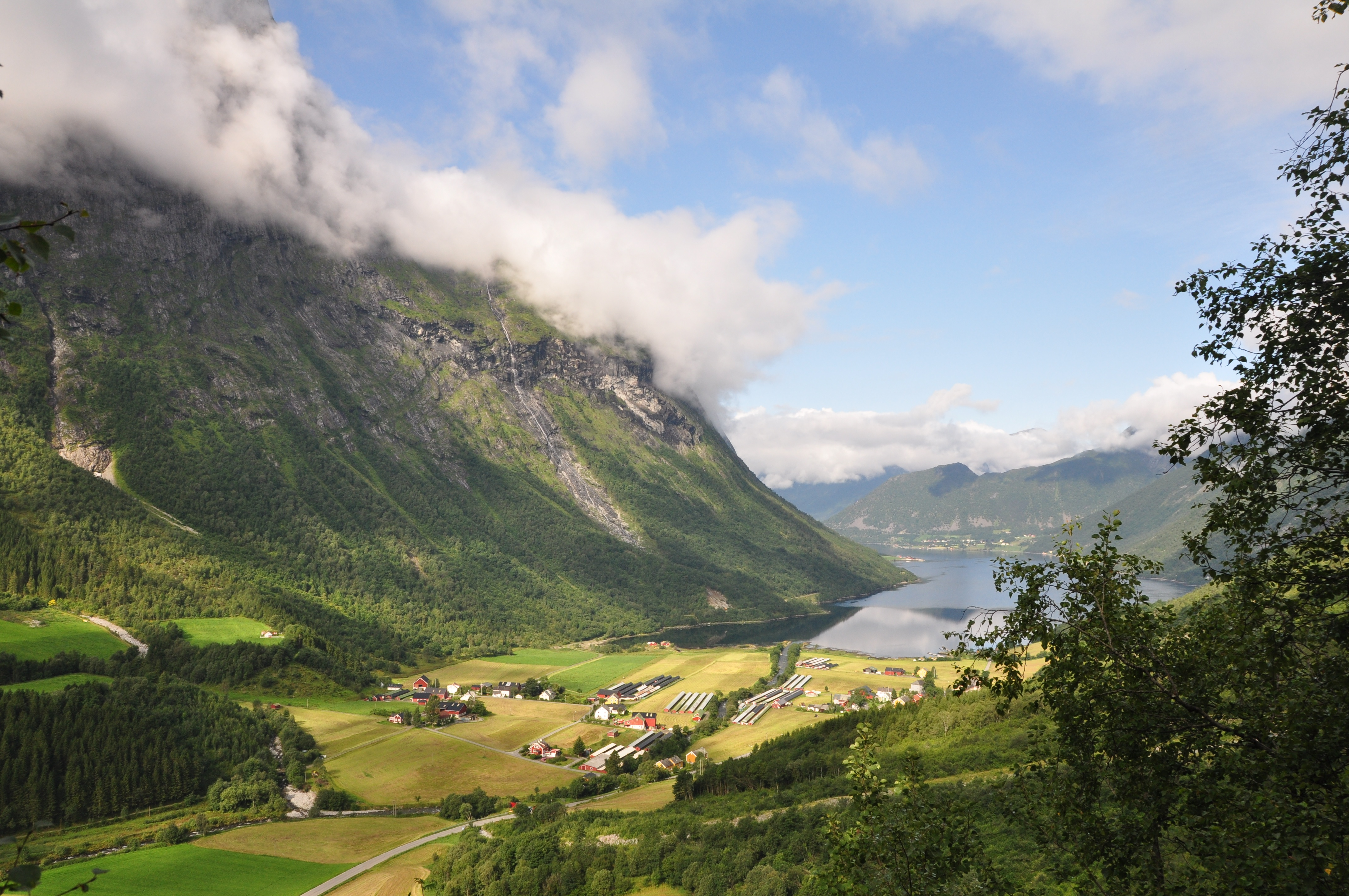 Øye in Norangsdalen valley, Ørsta, Norway